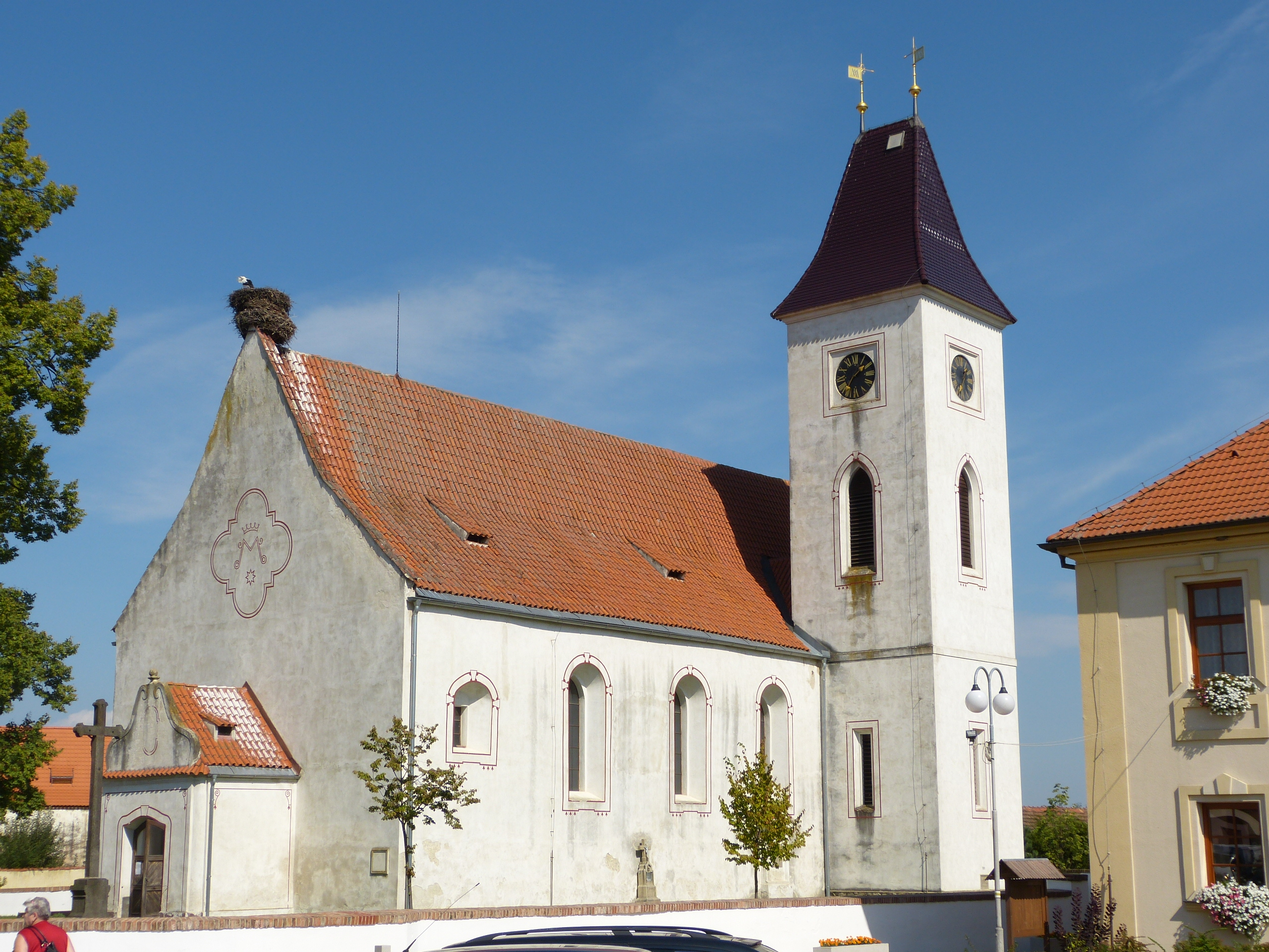 Kostel Nanebevzetí Panny Marie, Dubné.